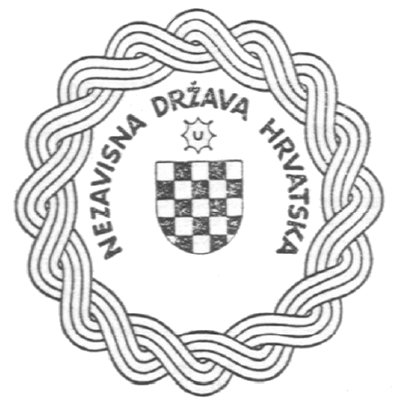 Staatswappen des Unabhängigen Staates Kroatien